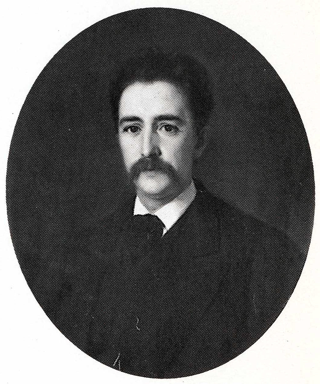 Helsingin yliopiston ylikirjastonhoitaja Wilhelm Bolin (1835–1924).